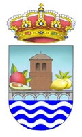 Escudo Benamargosa